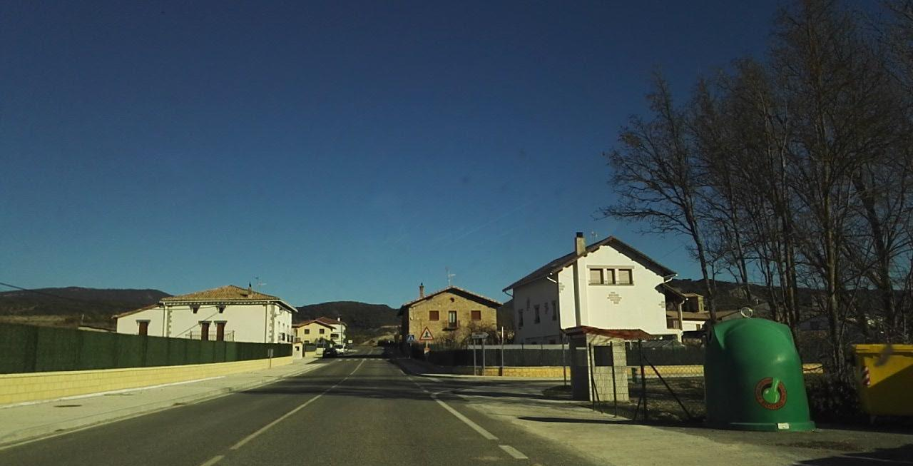 Domeño, Romanzado, Navarra